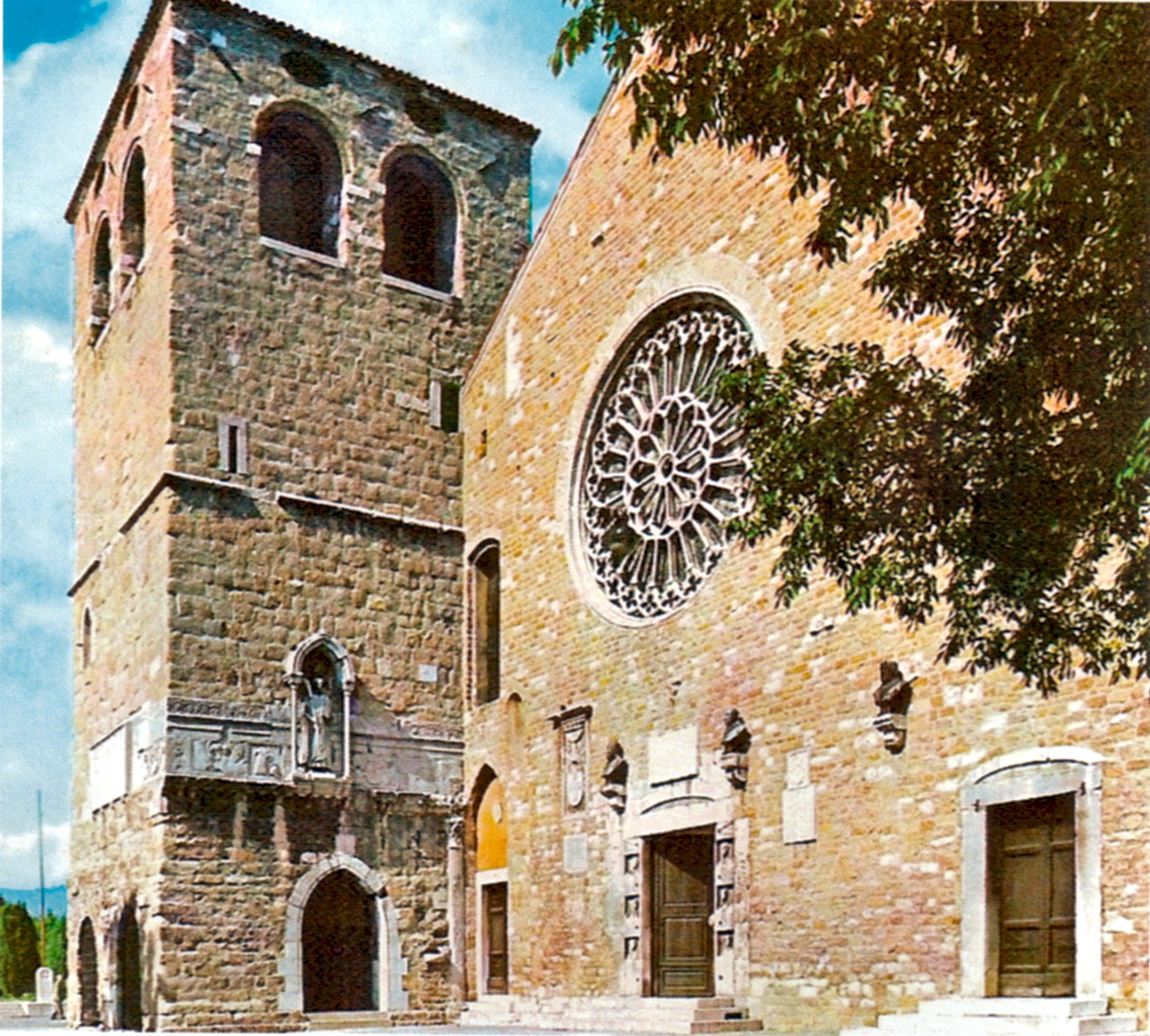 Kathedrale St. Giusto in Triest 2004